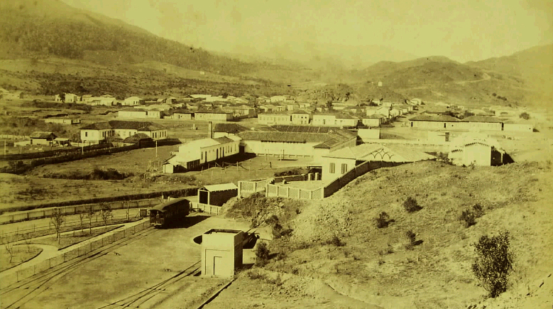 Vista panorâmica da cidade de Poços de Caldas, Minas Gerais, Brasil